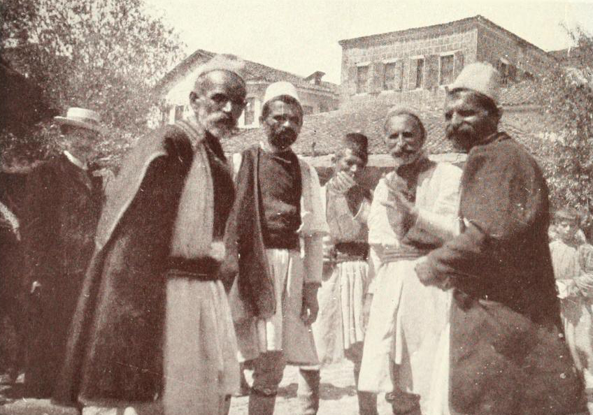 Arrumanos macedonios a comienzos del siglo XX.